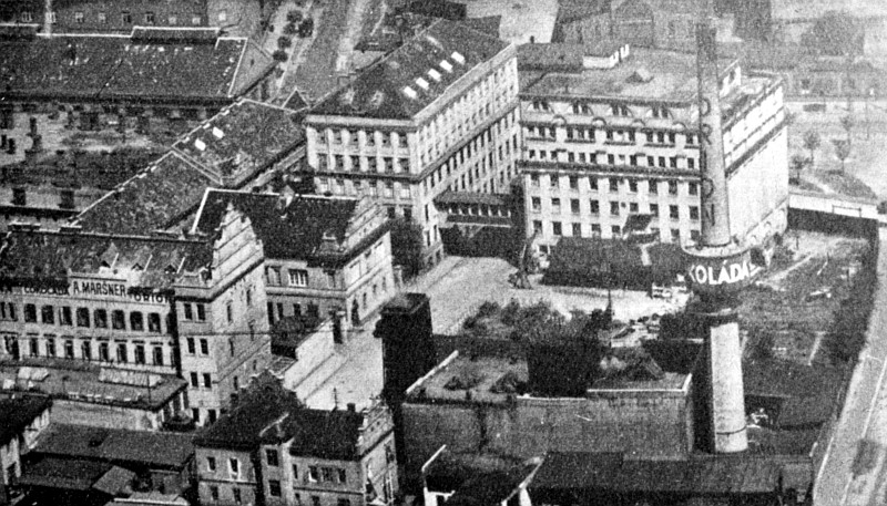 Otakar Novotný: Administrativní budova a skladiště továrny Orion (1923-1925)